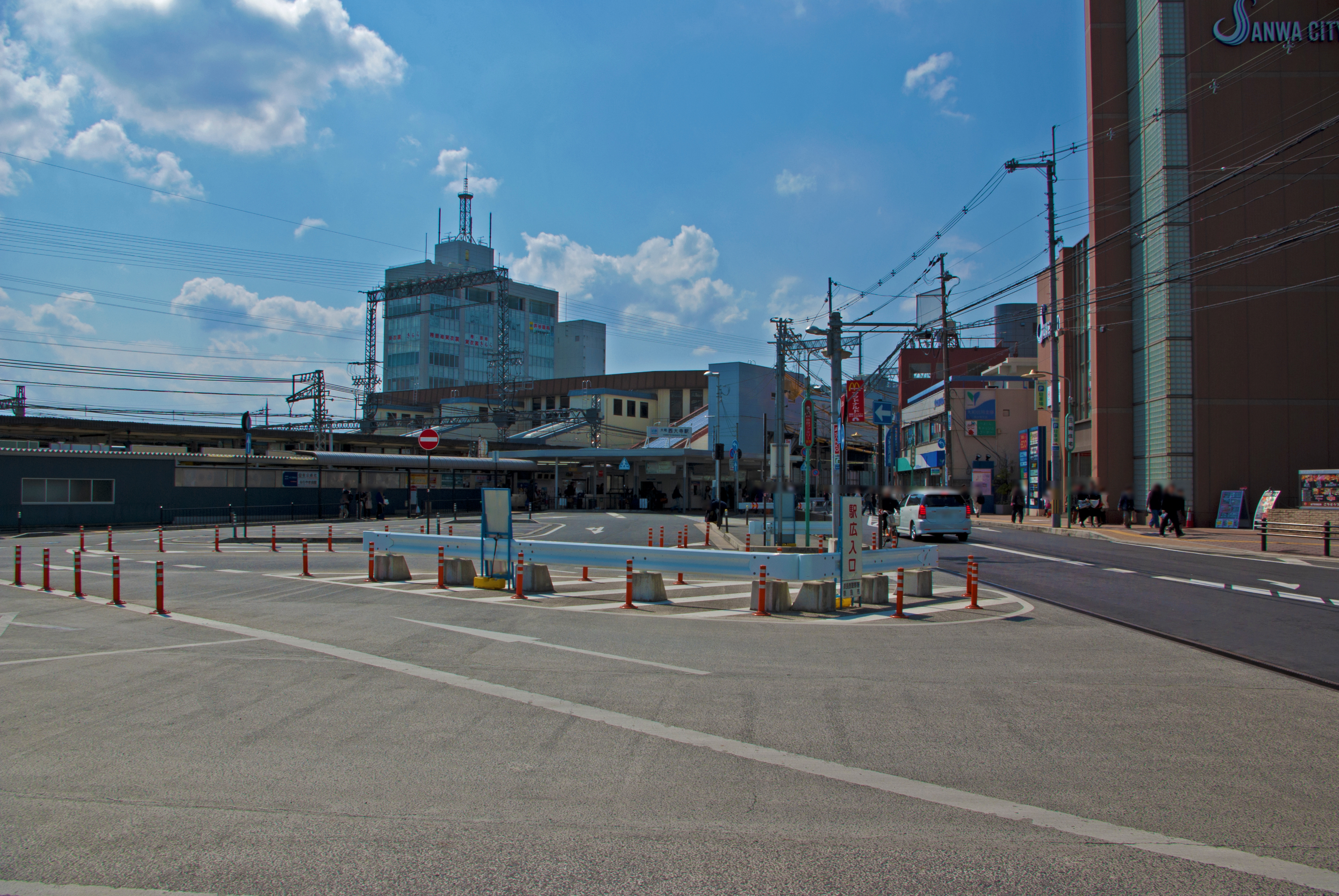 近畿日本鉄道京都線、奈良線、橿原線大和西大寺駅